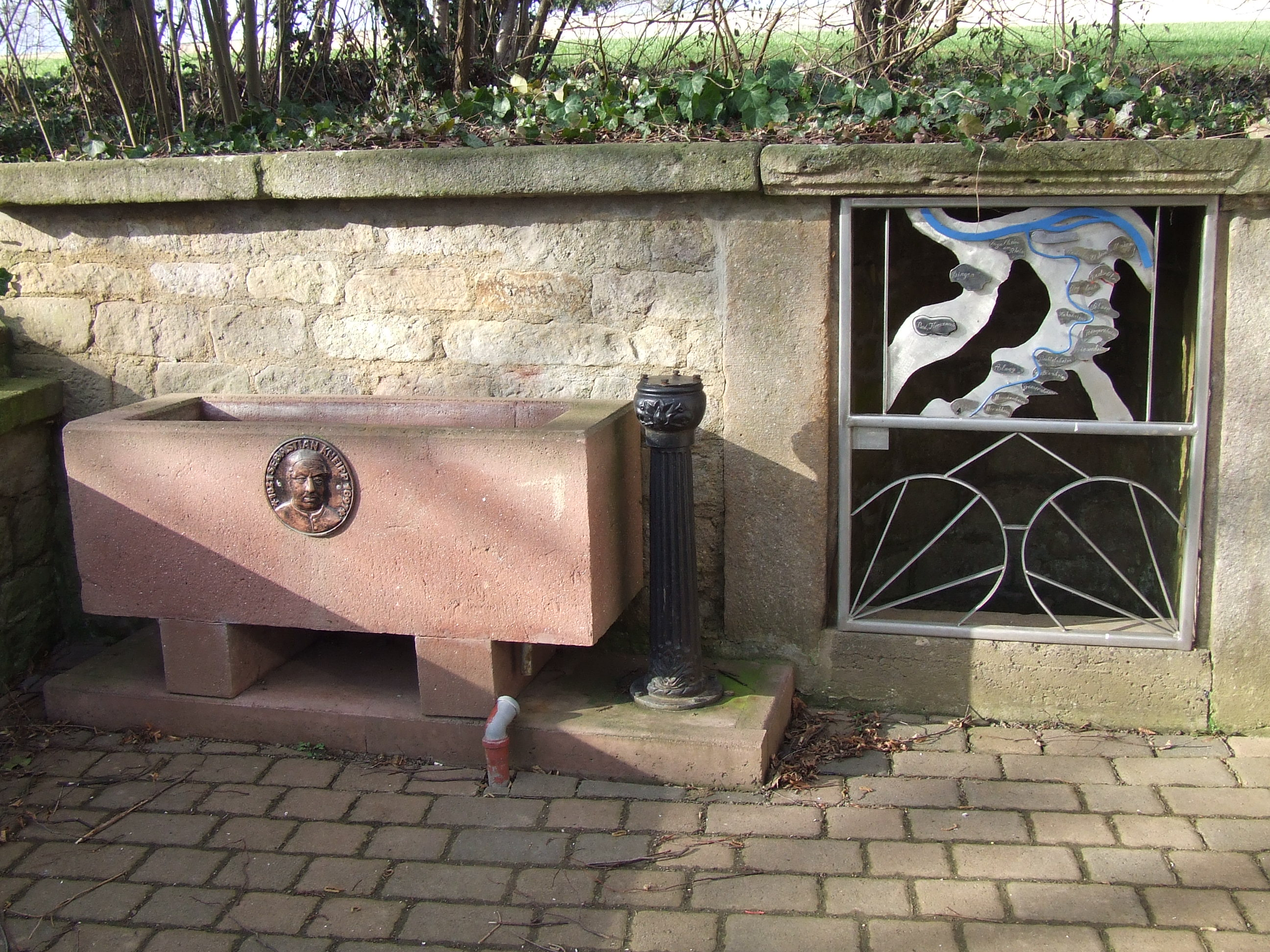 Selz (River), Selz (Fluss)